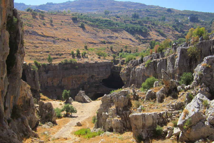 Balou Baatara - Sinkhole